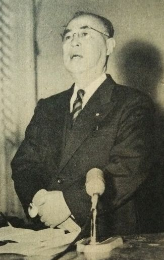 森戸辰男（1956年度広島大学入学式にて）